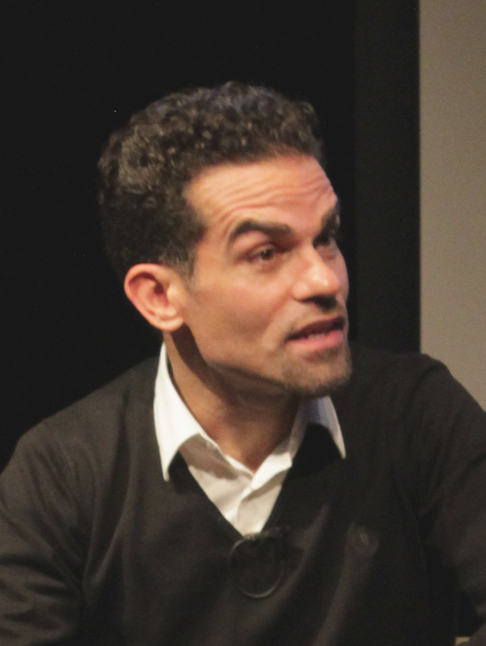 Antonio Najarro, director del Ballet Nacional de España アントニオ・ナハーロ